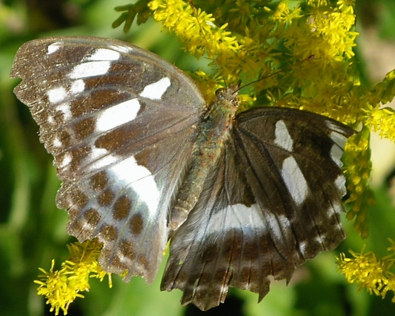 Damora sagana(メスグロヒョウモン), Female(メス), Nagasaki(長崎市)